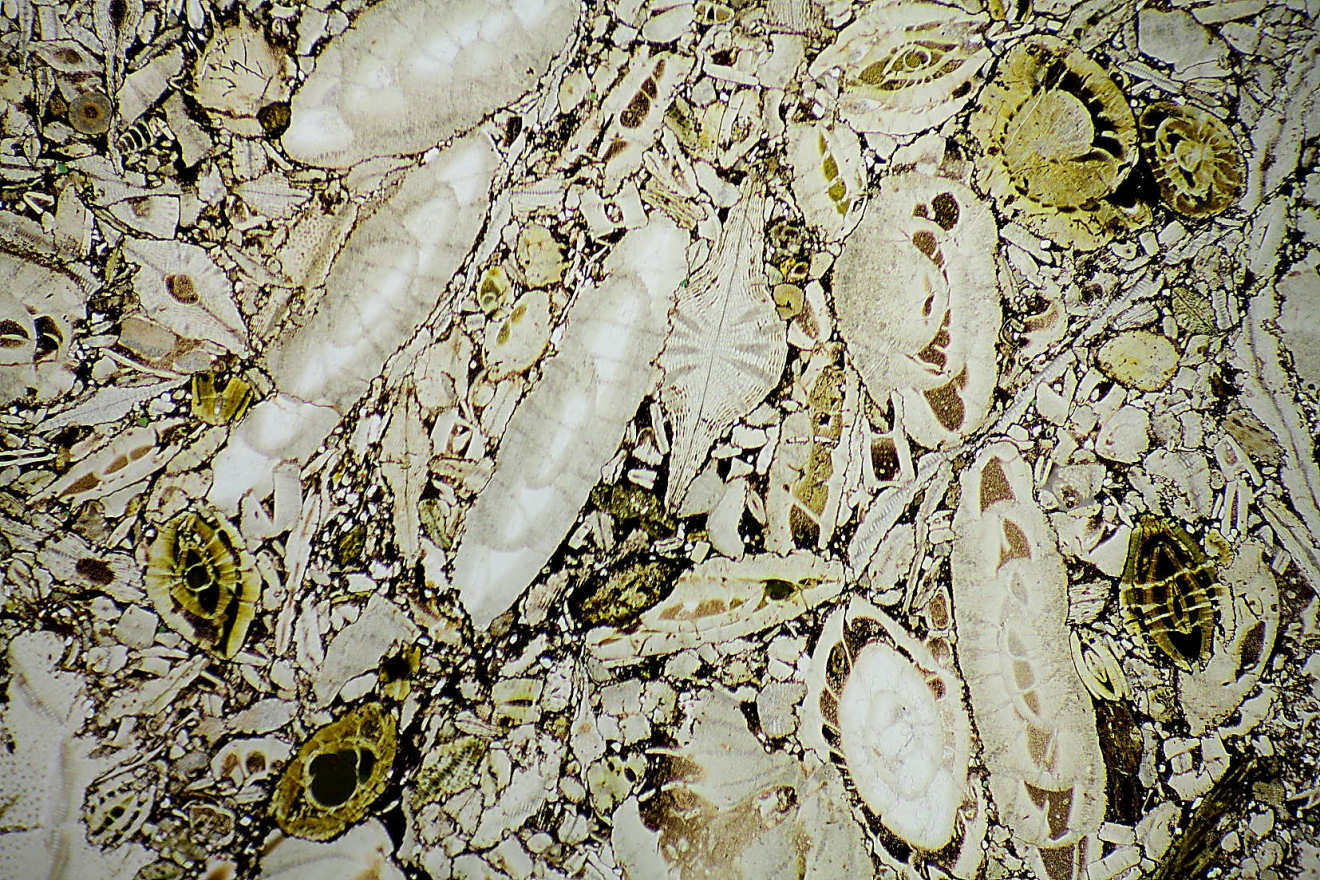 Großforaminiferen als Gesteinsbildner, Erzkalk von Grünten im Allgäu